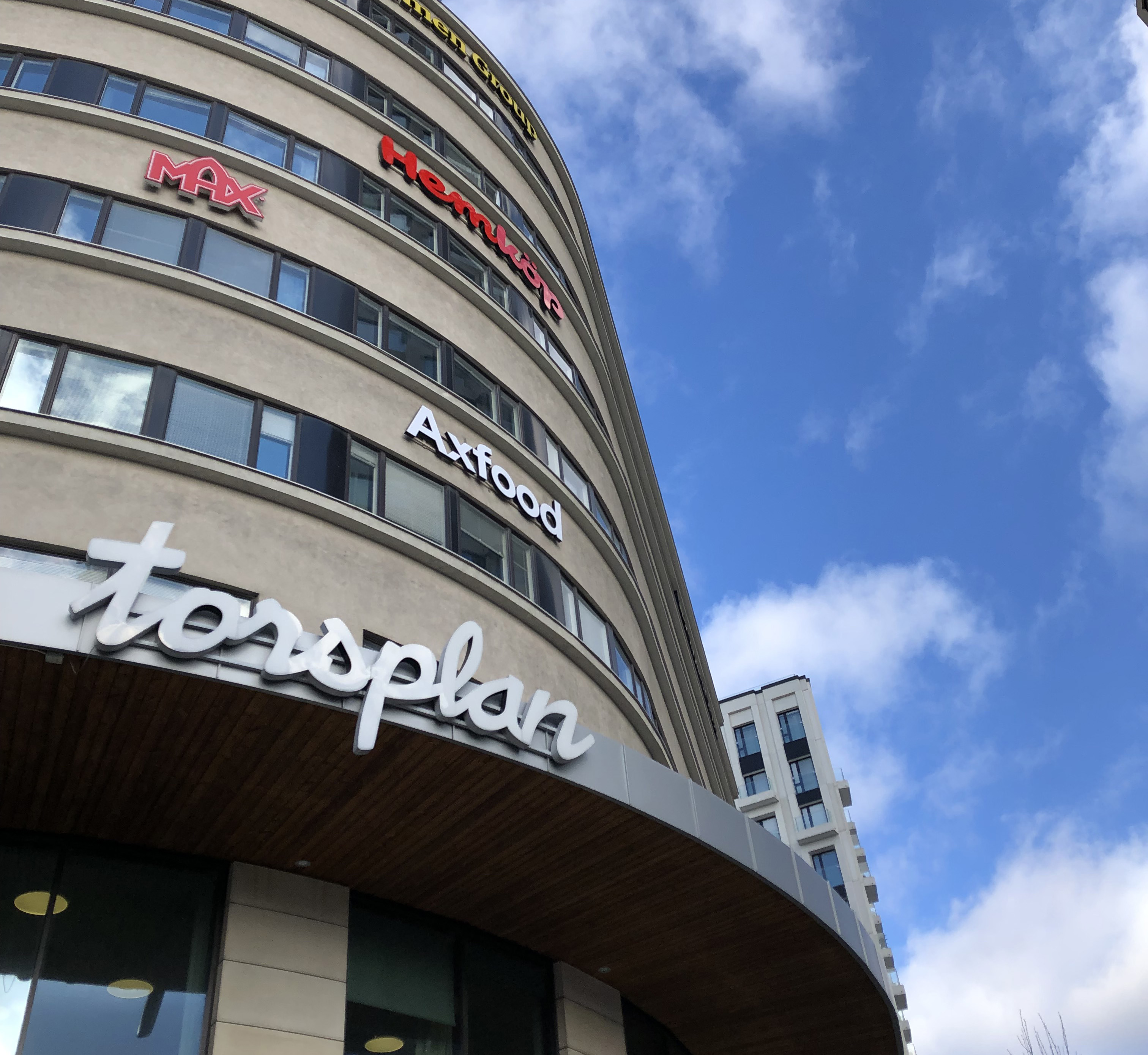 Axfoods huvudkontor på Torsplan i Stockholm